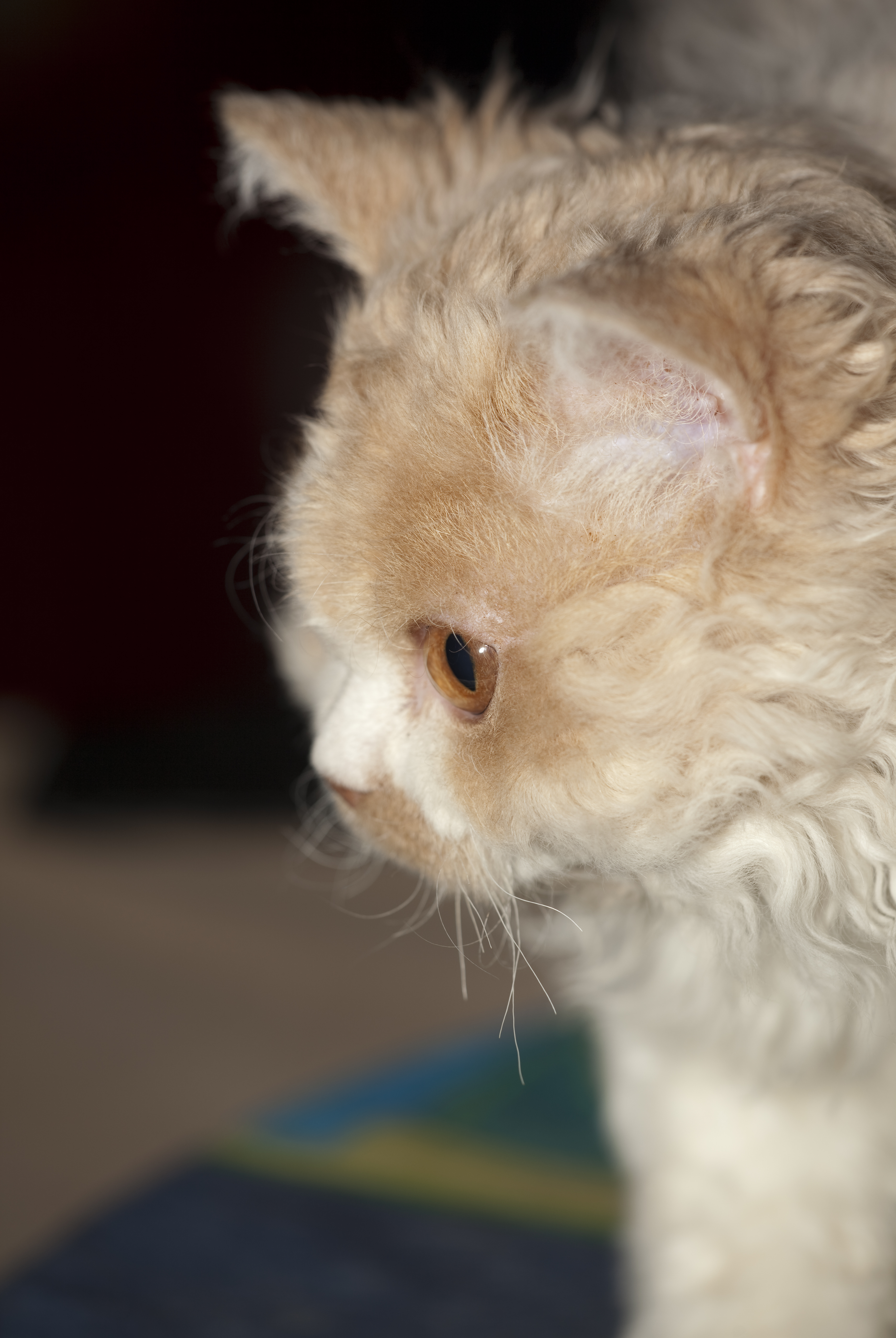 Селкирк-рекс полудлинношёрстный. Кто опознал своё животное, просьба связаться со мной по